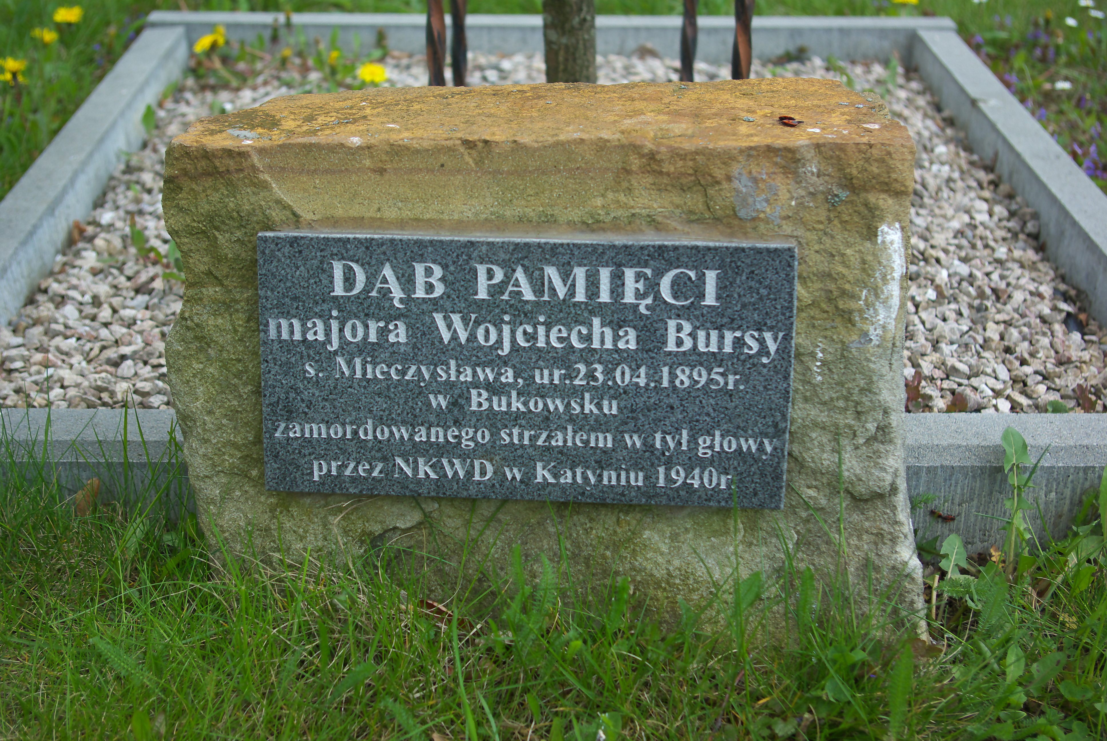 Dąb Pamięci honorujący Wojciecha Bursę w Dudyńcach